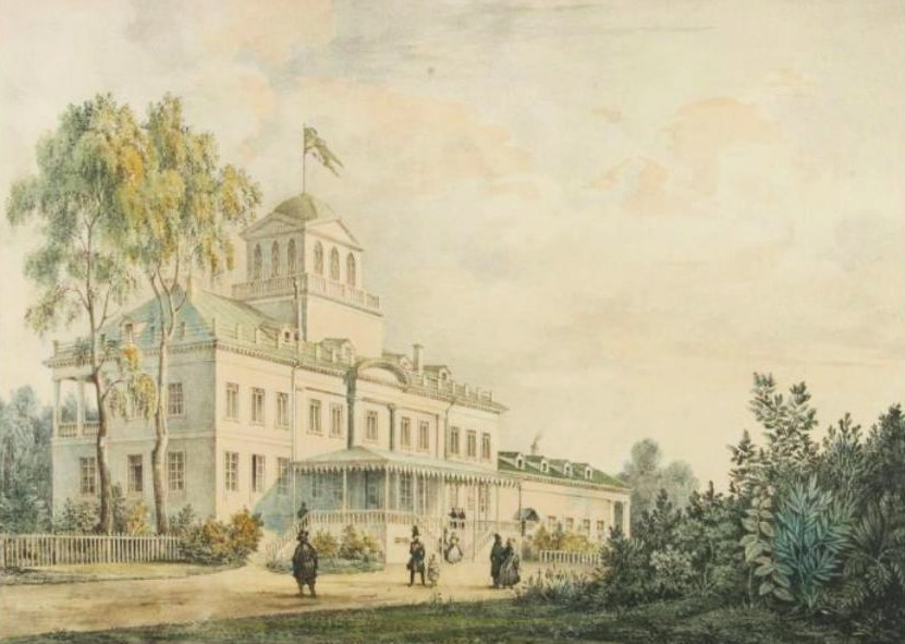 Усадьба княгини Лопухиной «Осиновая роща» в Парголово.